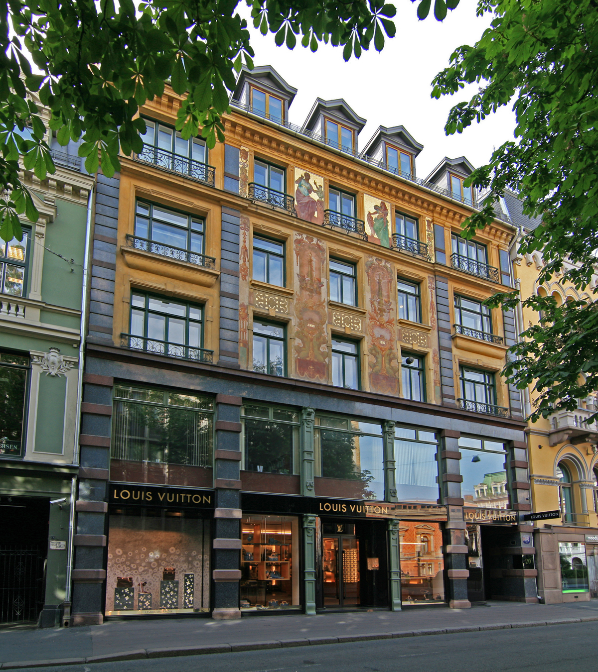 «Skreddergården», Akersgata 20, Oslo. Built 1894. Architect: Christian Reuter